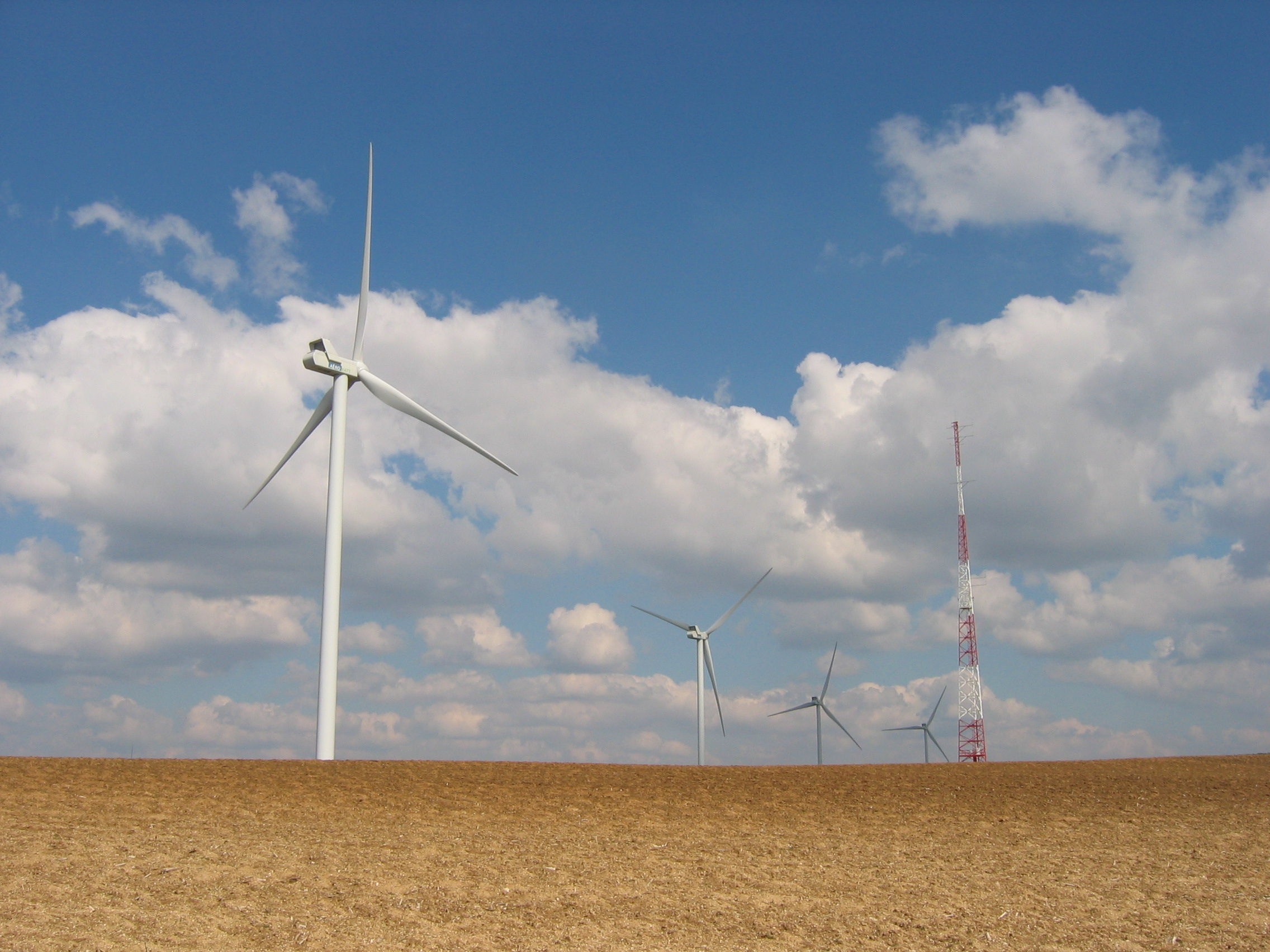 avril 2015 éoliennes du Thour, parc de la Motelle, Ardennes, France